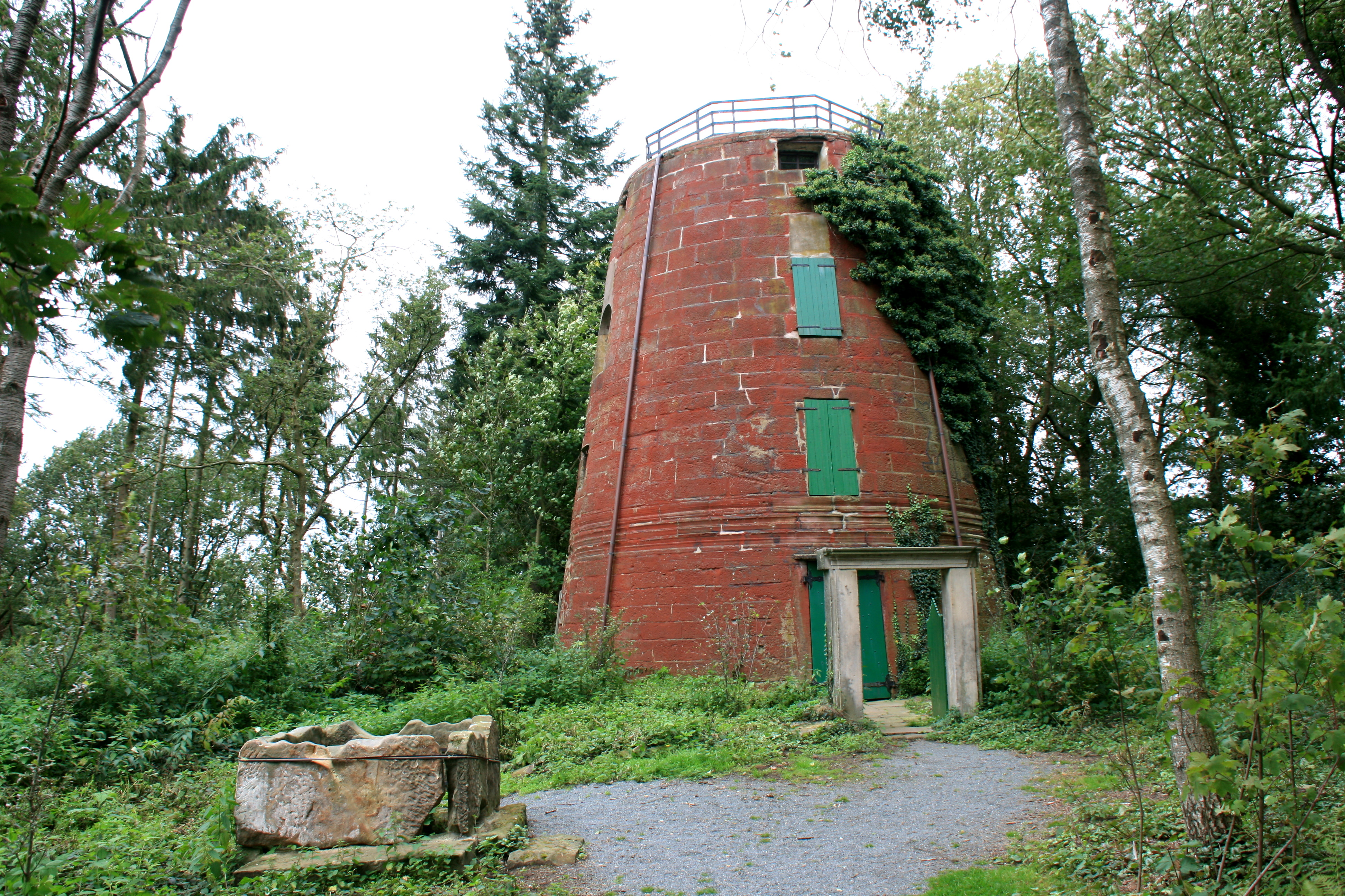 Lukas-Mühle, Mühlenberg in Gildehaus Bad Bentheim